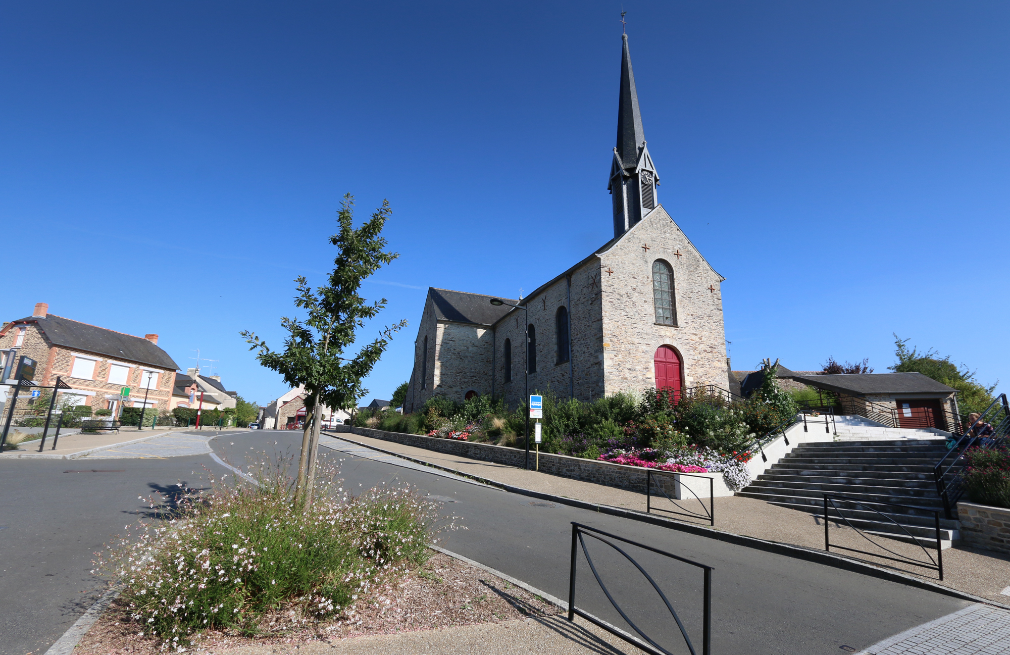 Église paroissiale Notre-Dame de l'Assomption de Crevin